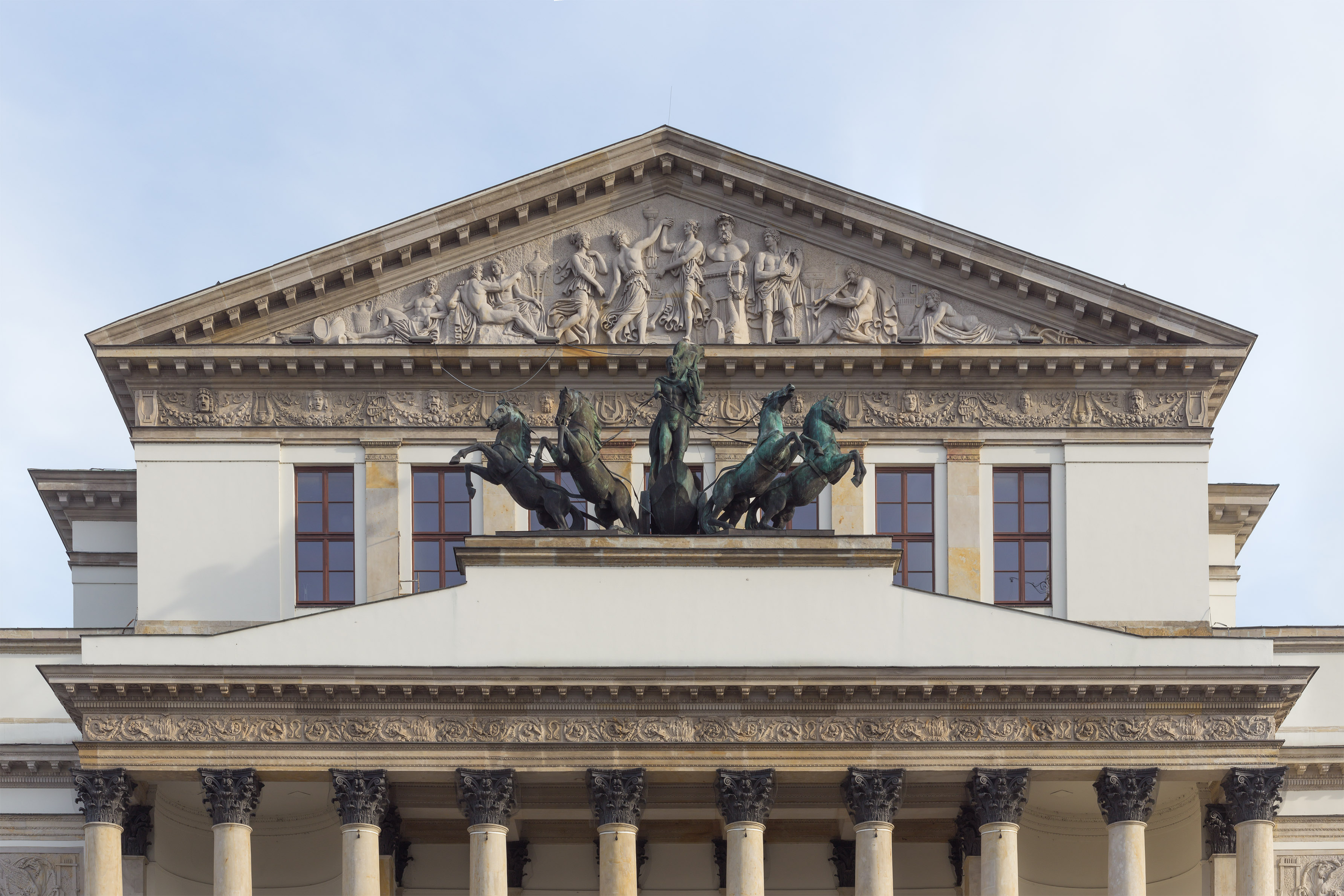 Budynek zlokalizowany przy placu Teatralnym w Warszawie, będący siedzibą Opery Narodowej. W Salach Redutowych mieści się Muzeum Teatralne oraz dwie spośród trzech scen Teatru Narodowego.